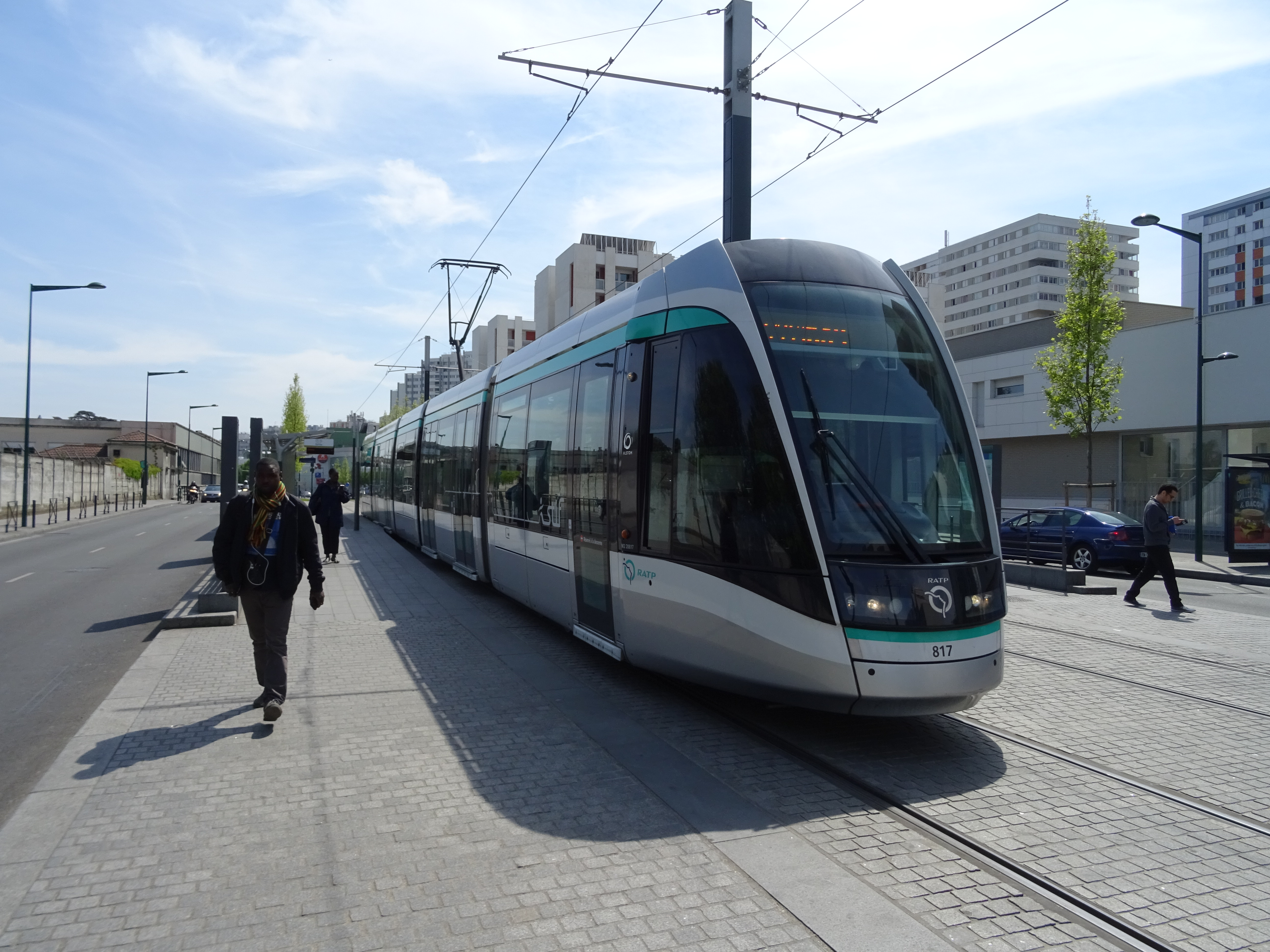 Citads 302 du T8 à Lacépède